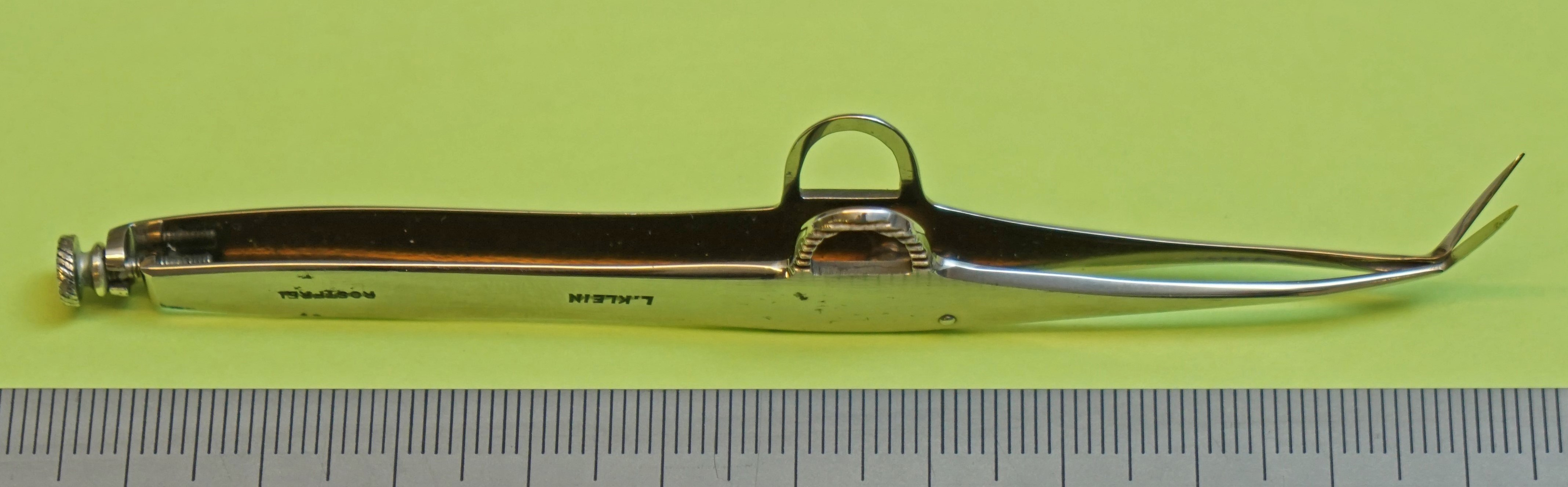 Irisschere nach Wecker, sog. Wecker-Schere